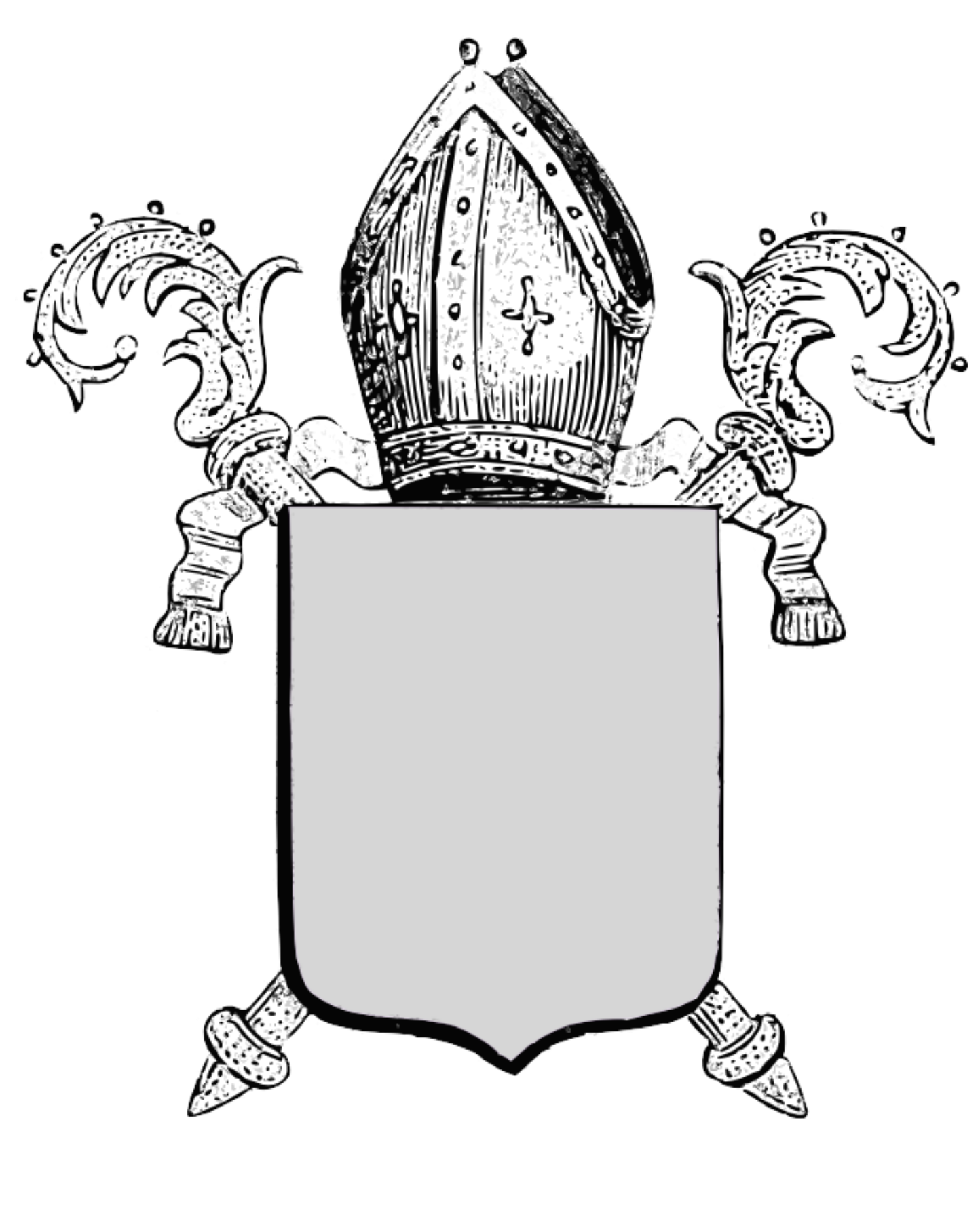 sjabloon abdij